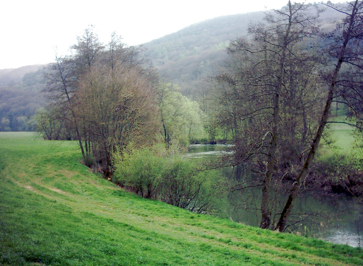 Fränkische Saale bei Morlesau Fotograf: presse03, selbst fotografiert, 2005 Lizenz: GNU-FDL